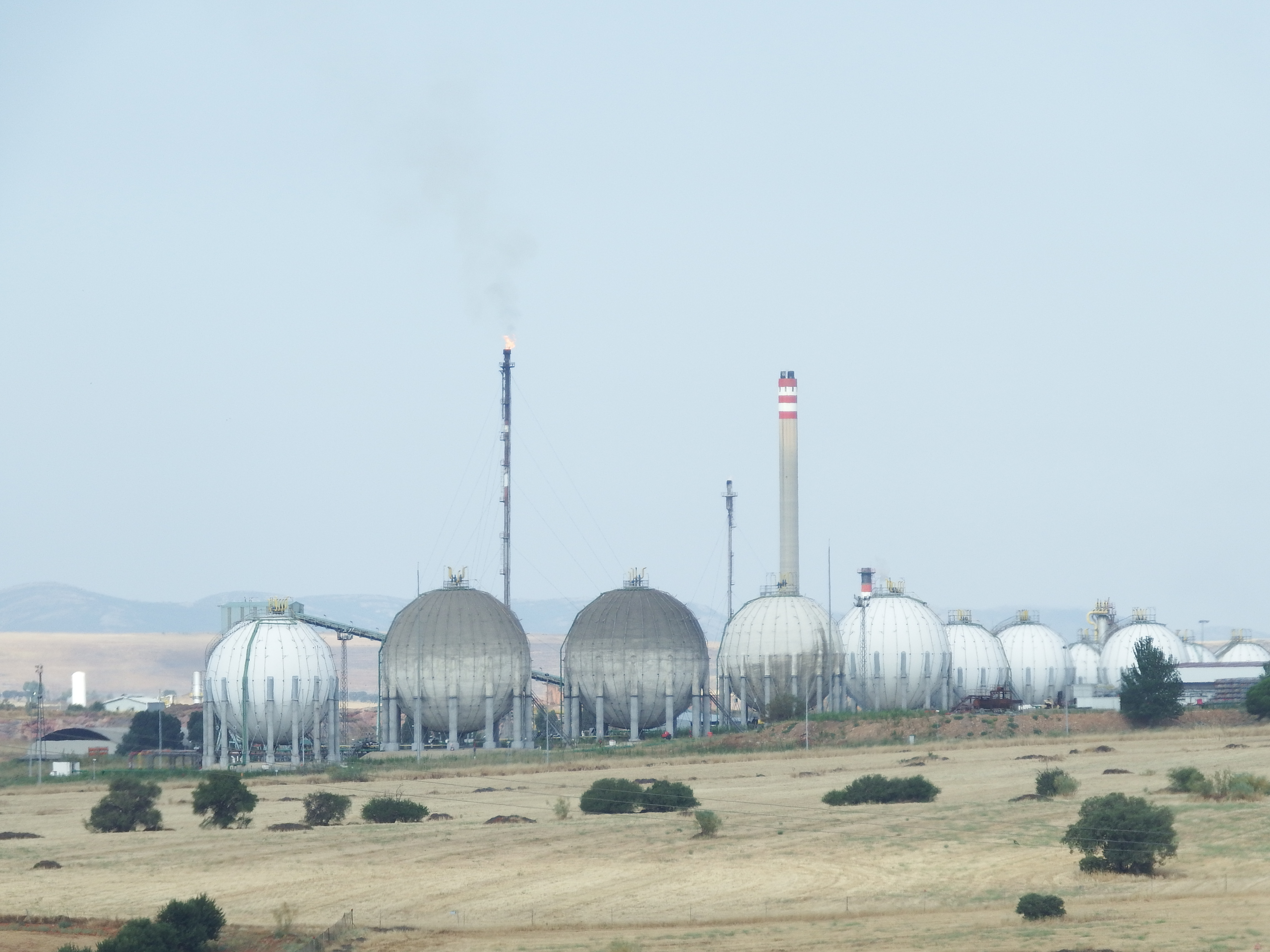 Central térmica en el complejo petroquímico de Puertollano